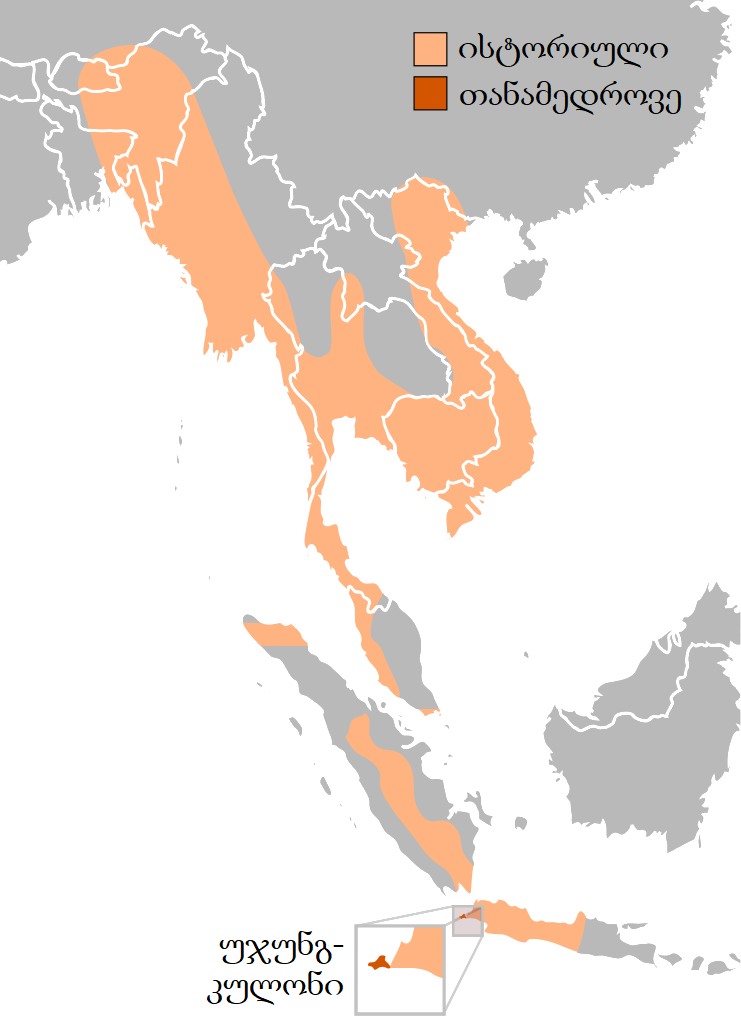 იავური მარტორქის ისტორიული და თანამედროვე გავრცელება